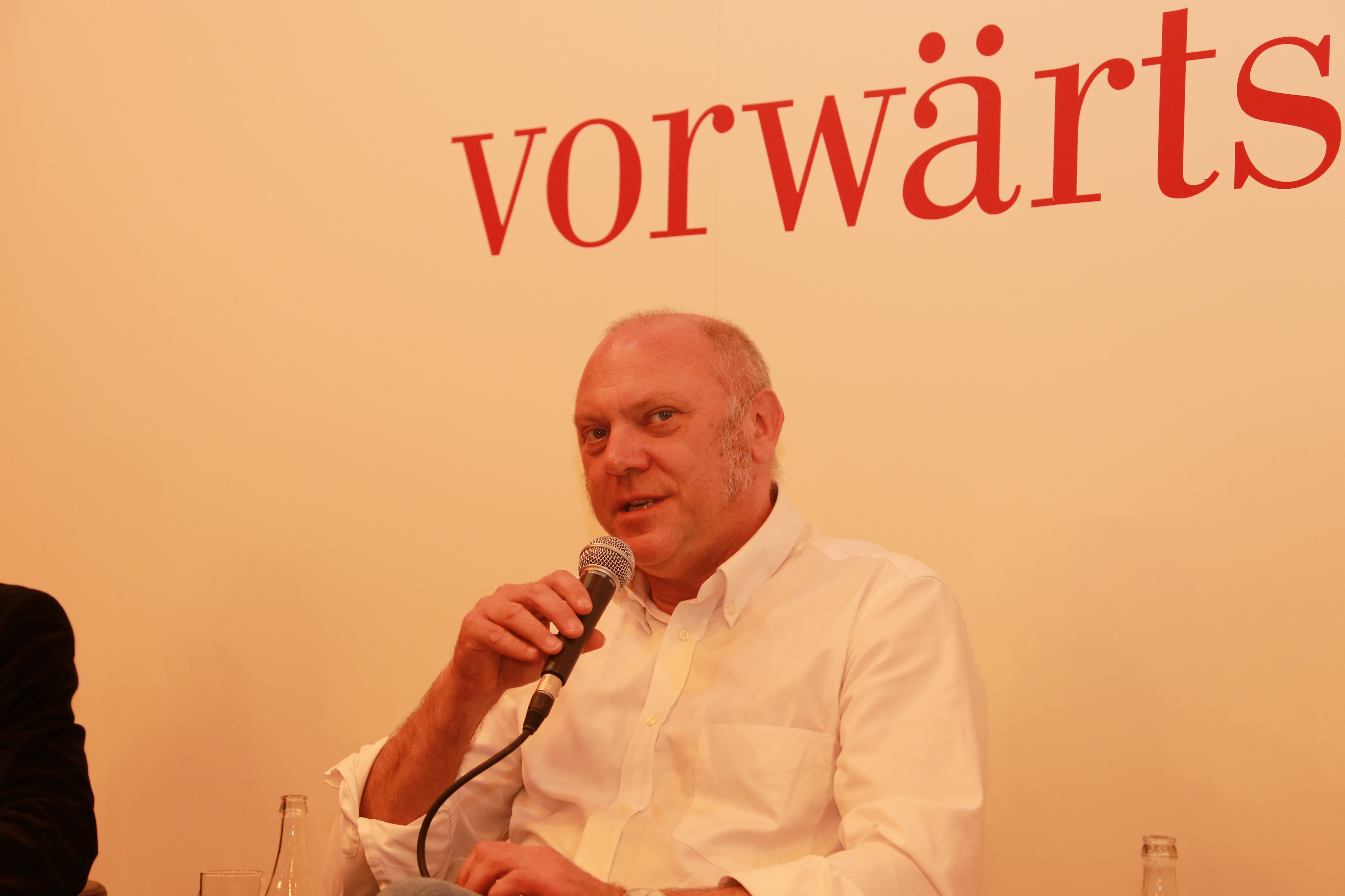 Ulrich Schneider, Paritätischer Wohlfahrtsverband